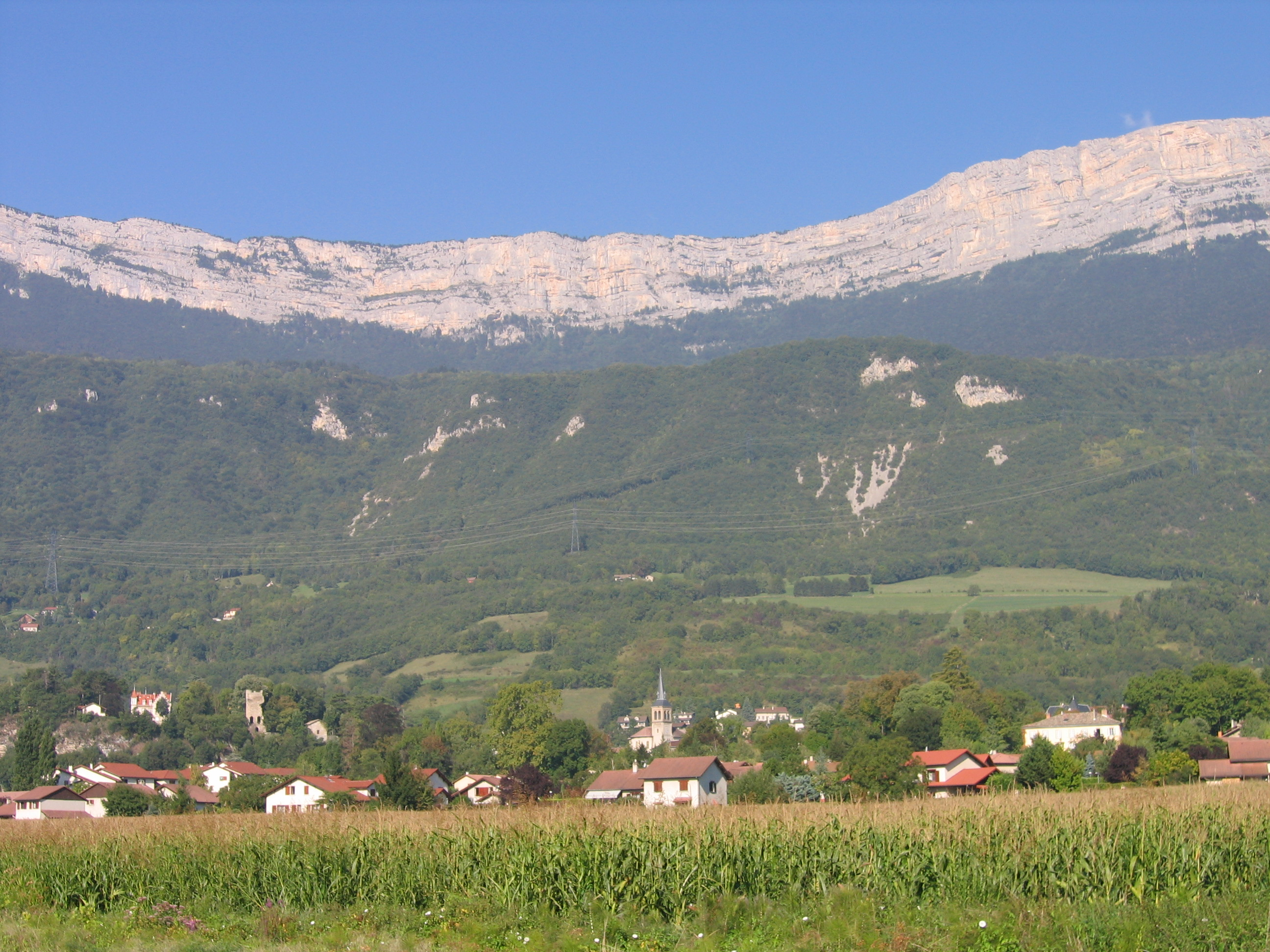 Vue du bourg de Claix et du Vercors